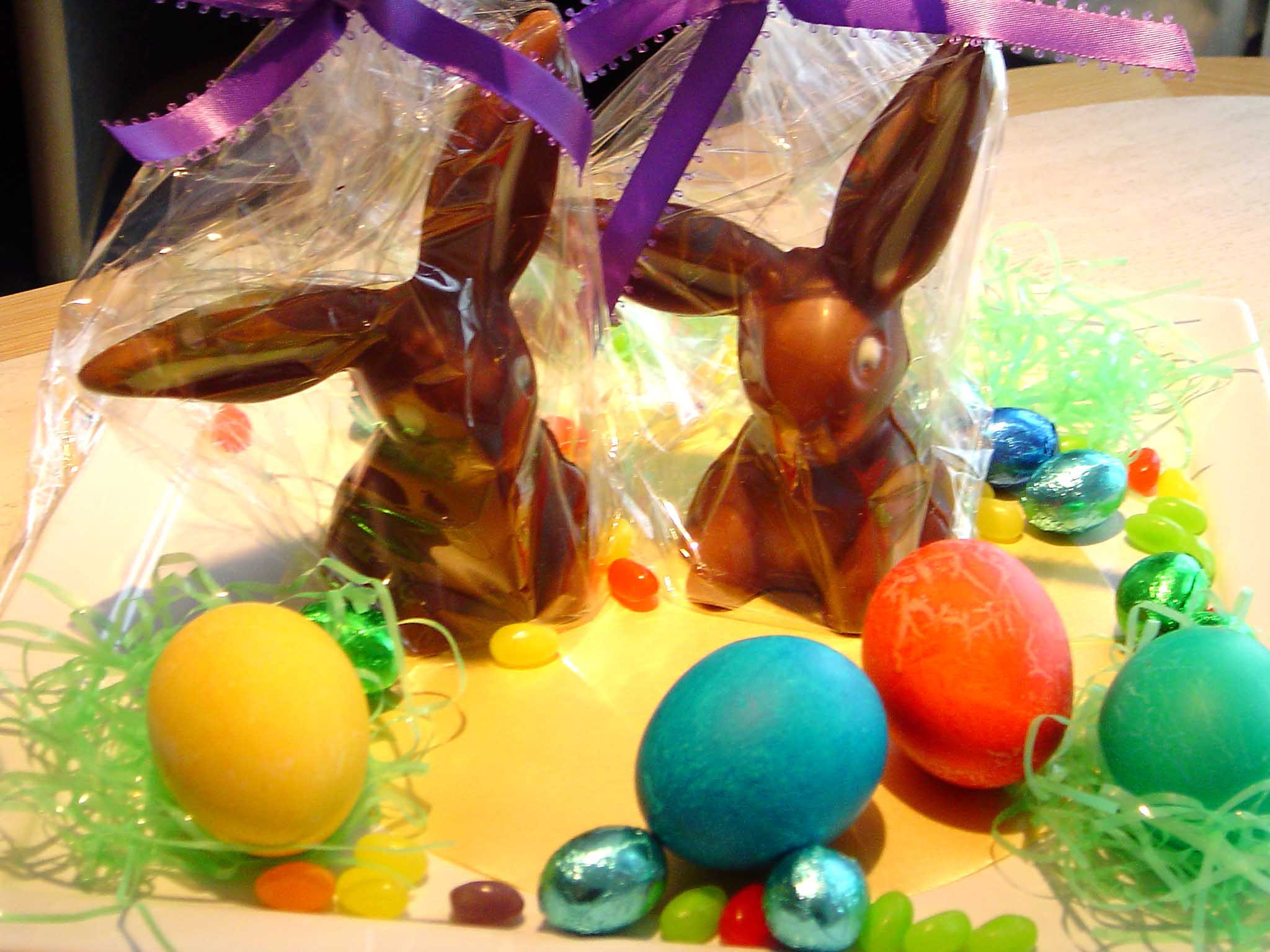 Ouschterhues matt Ouchtereeër